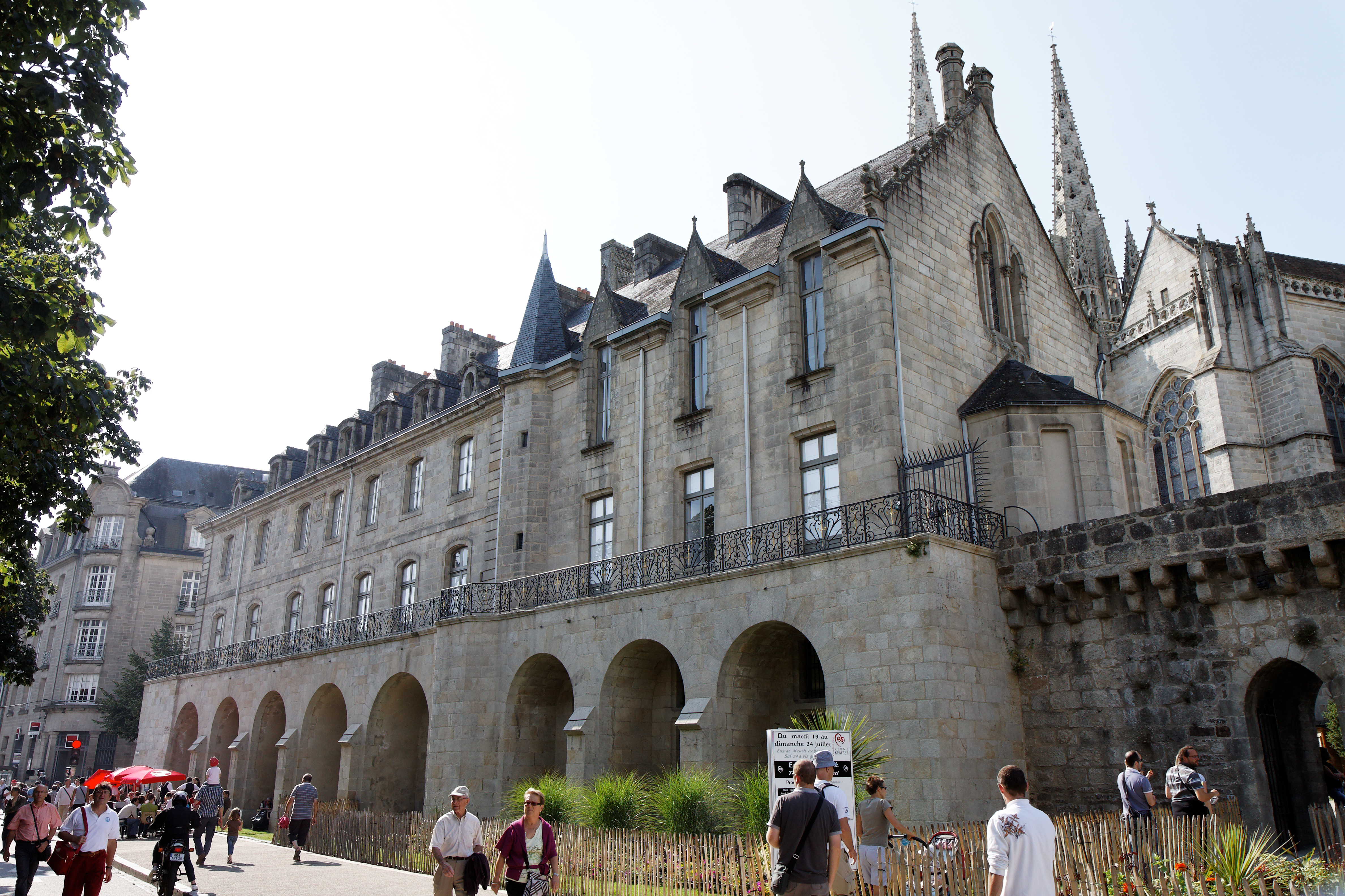 L'ancien évêché de Quimper abritant le musée départemental breton. .